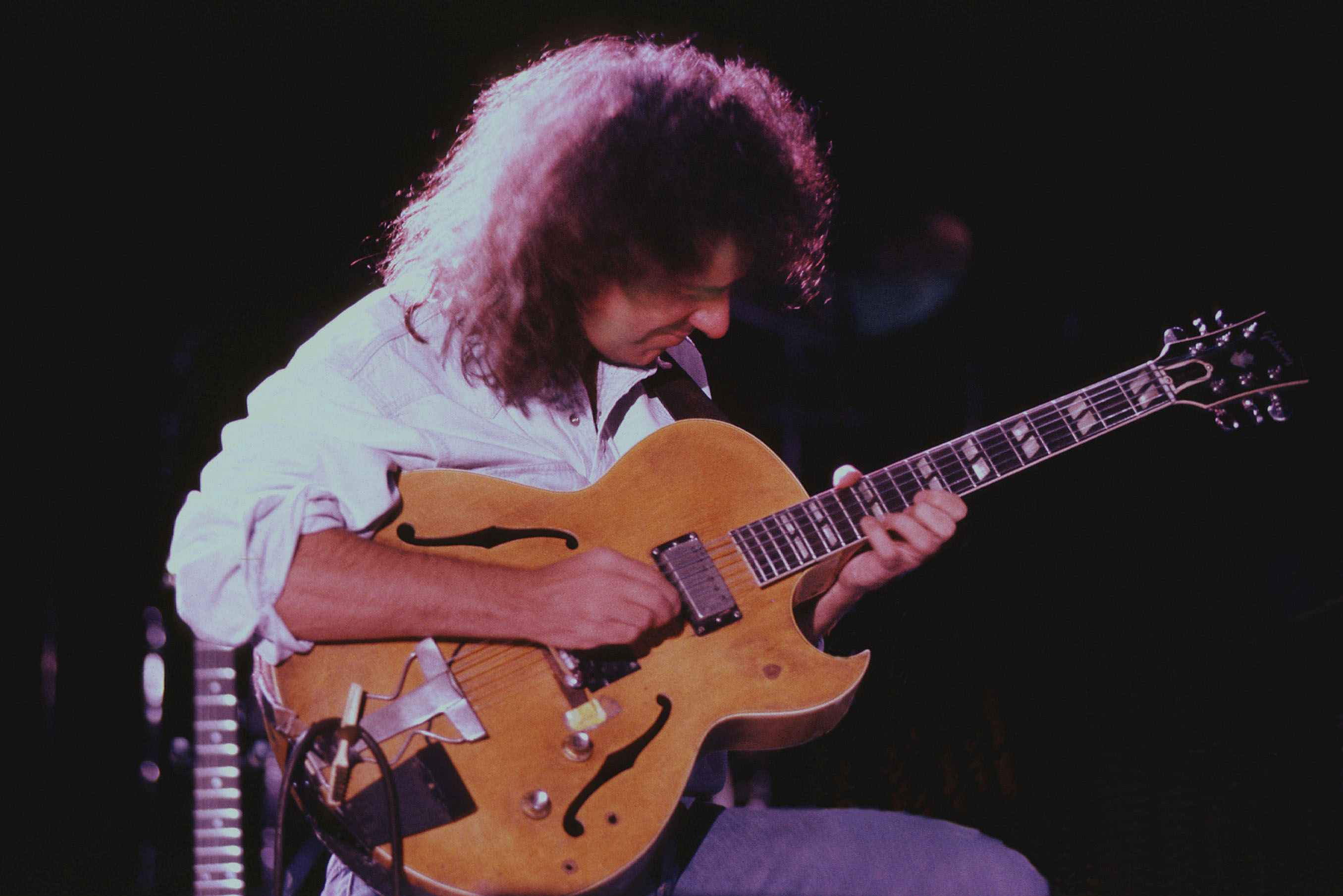 Pat Metheny